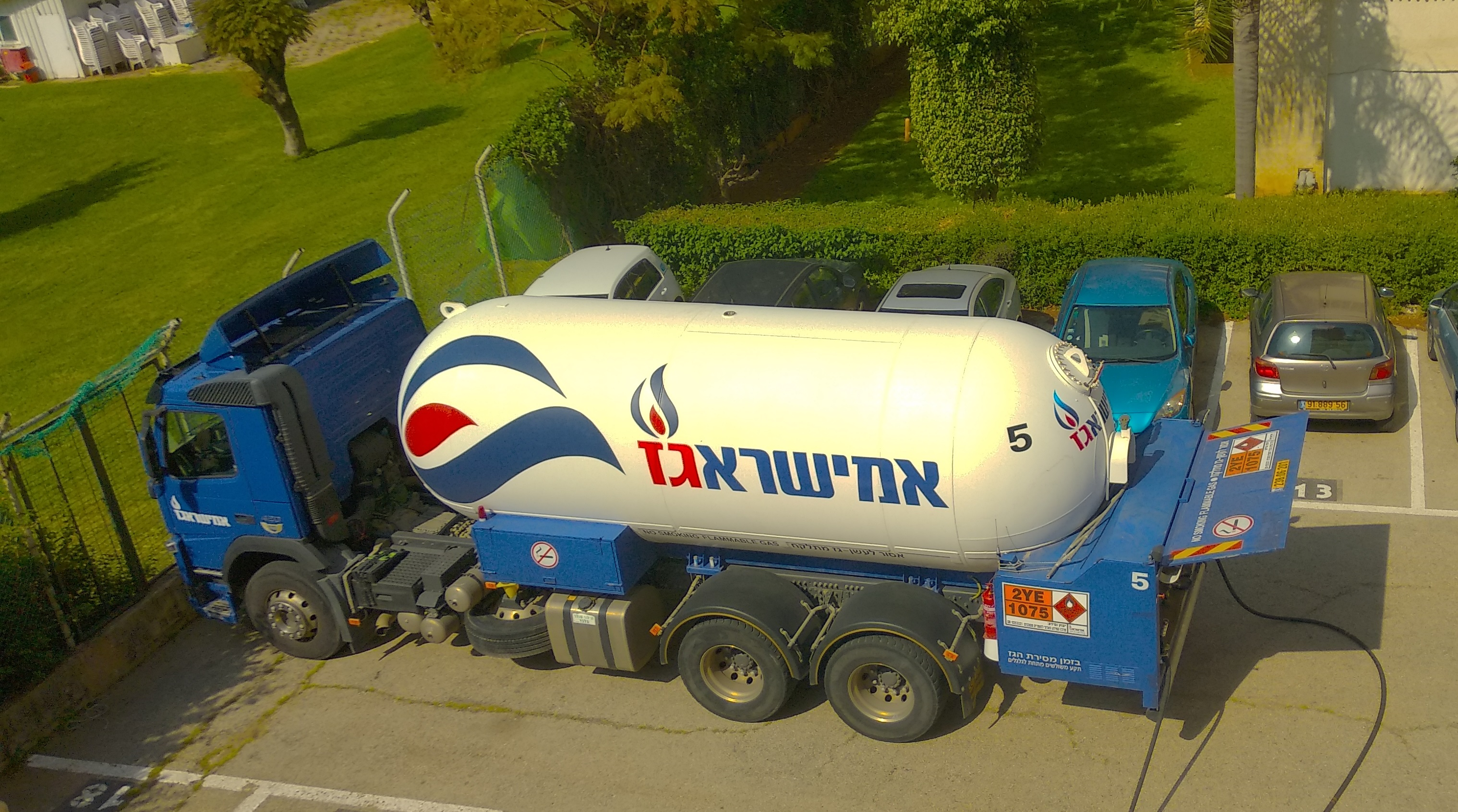 מכלית גז של אמישראגז